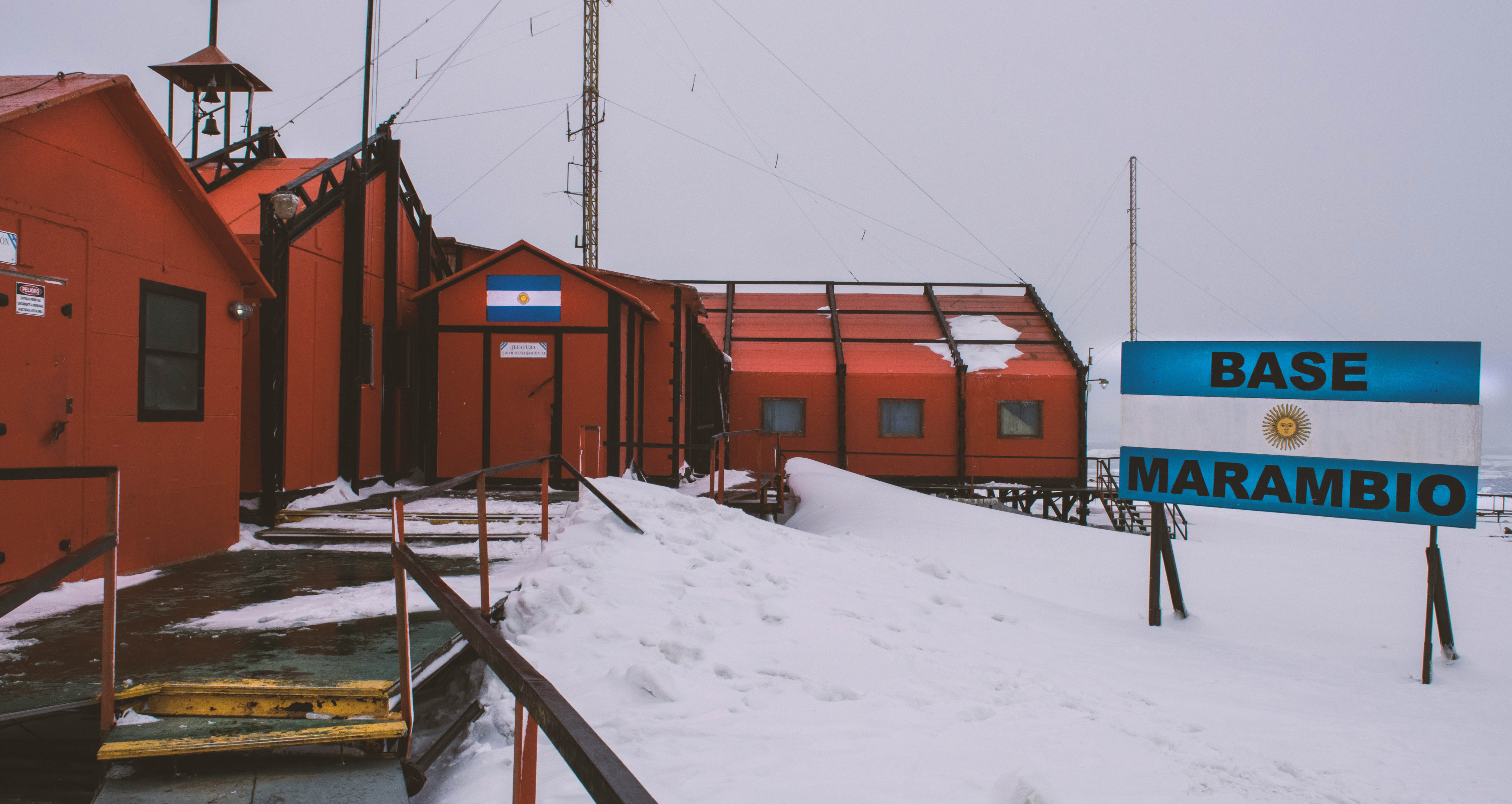 La Campaña Antártica, que se desarrolla en forma ininterrumpida desde 1904, es un trabajo conjunto entre militares y civiles para abastecer las bases y los centros de investigación con insumos, víveres, combustible y material de trabajo para el resto del año.